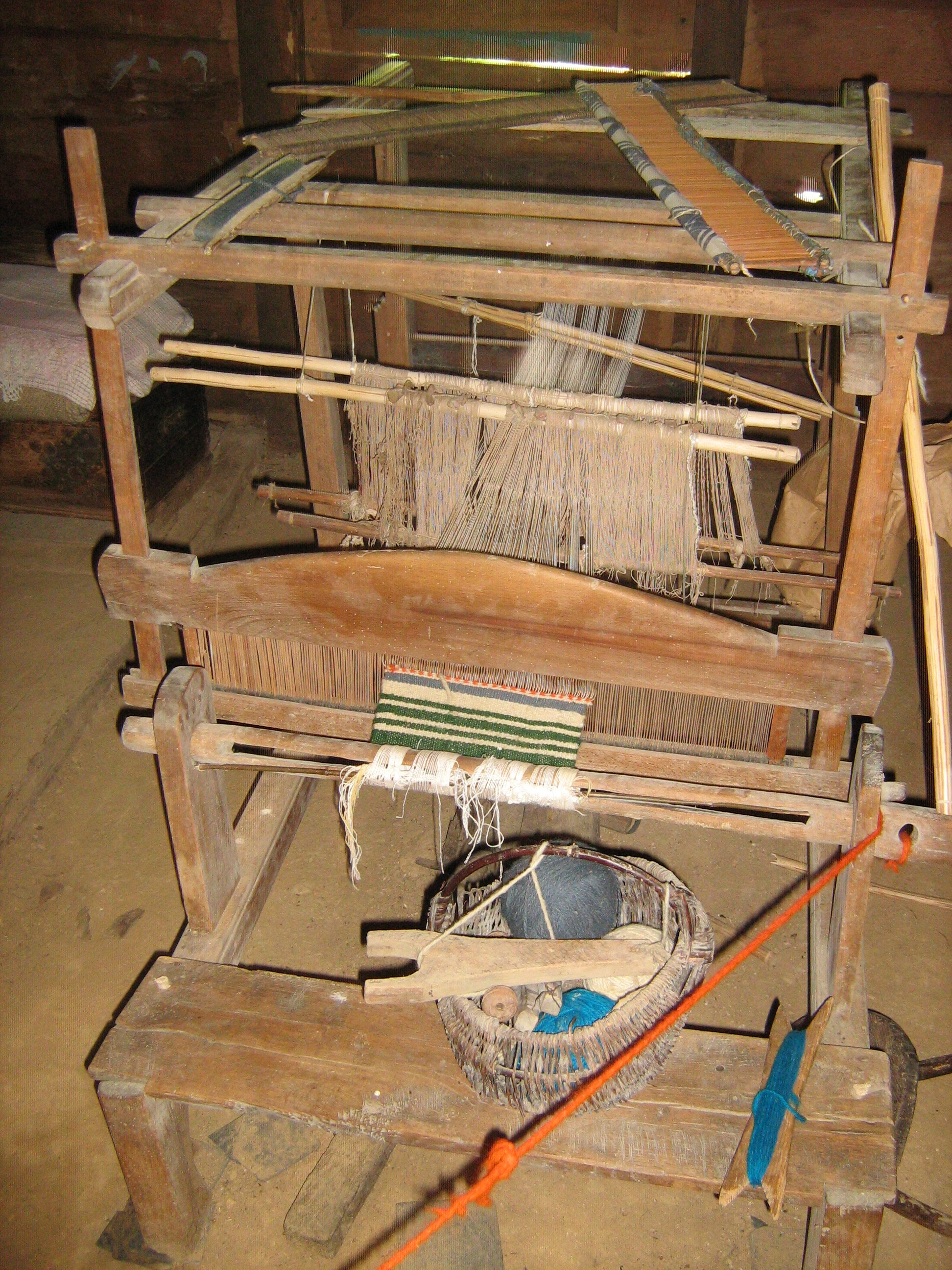 Разбој за ткање у Вуковој кући